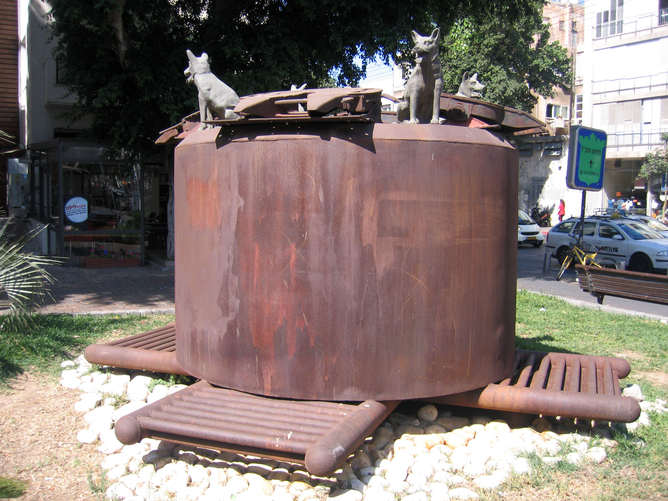 Sculpture